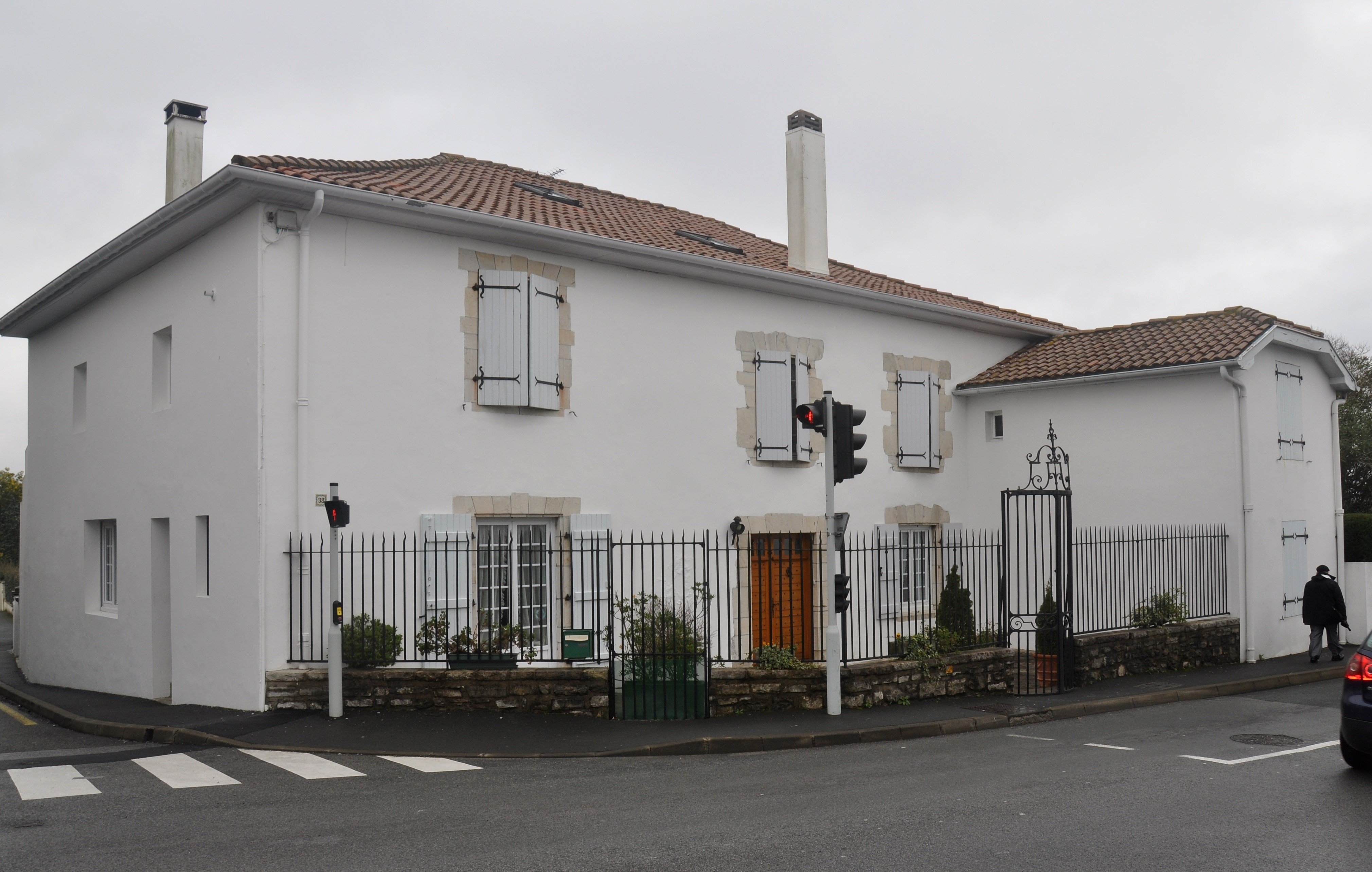 MAISON PLACE LAMOTHE ANGLET